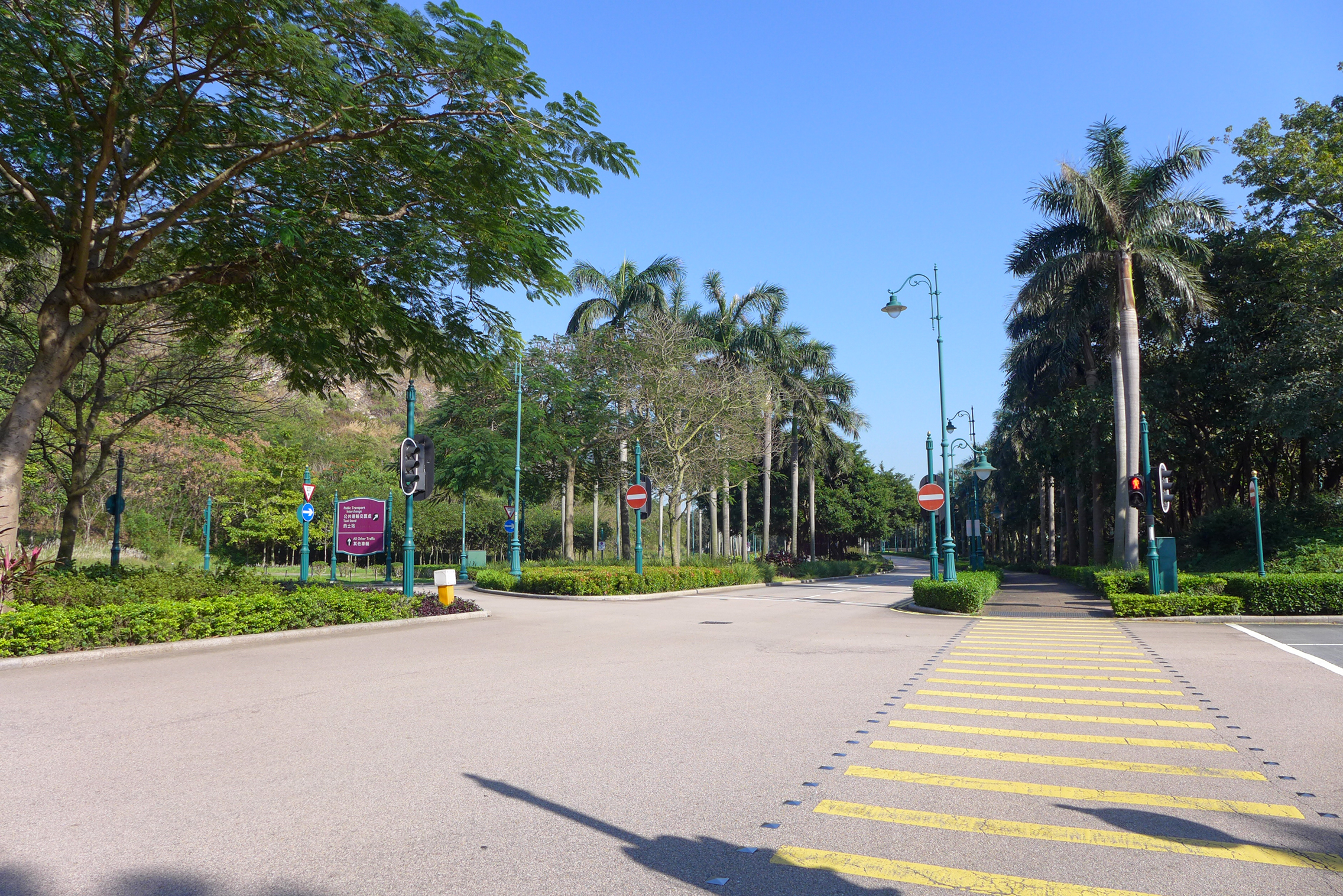 Magic Road